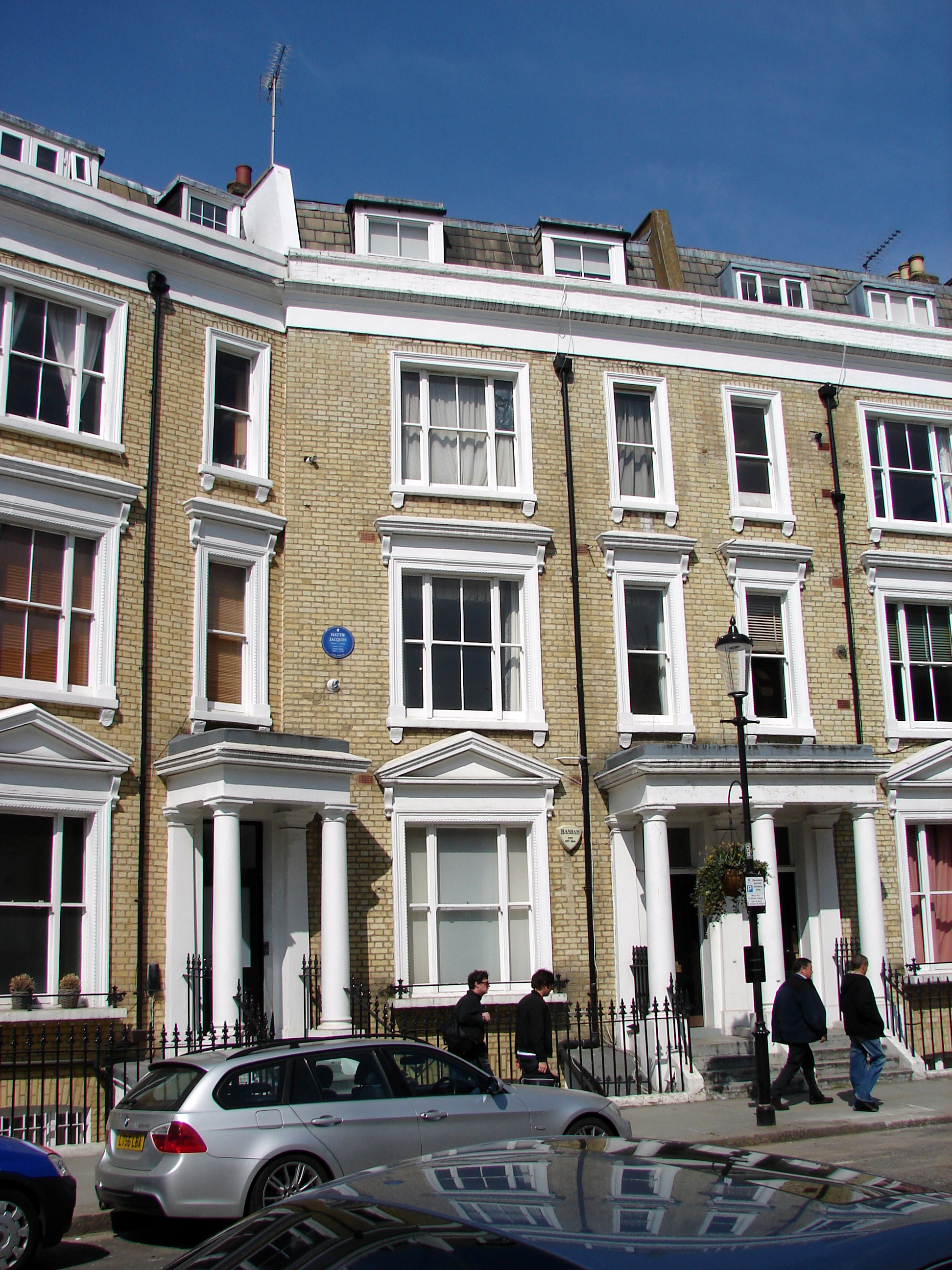 Hattie Jacques